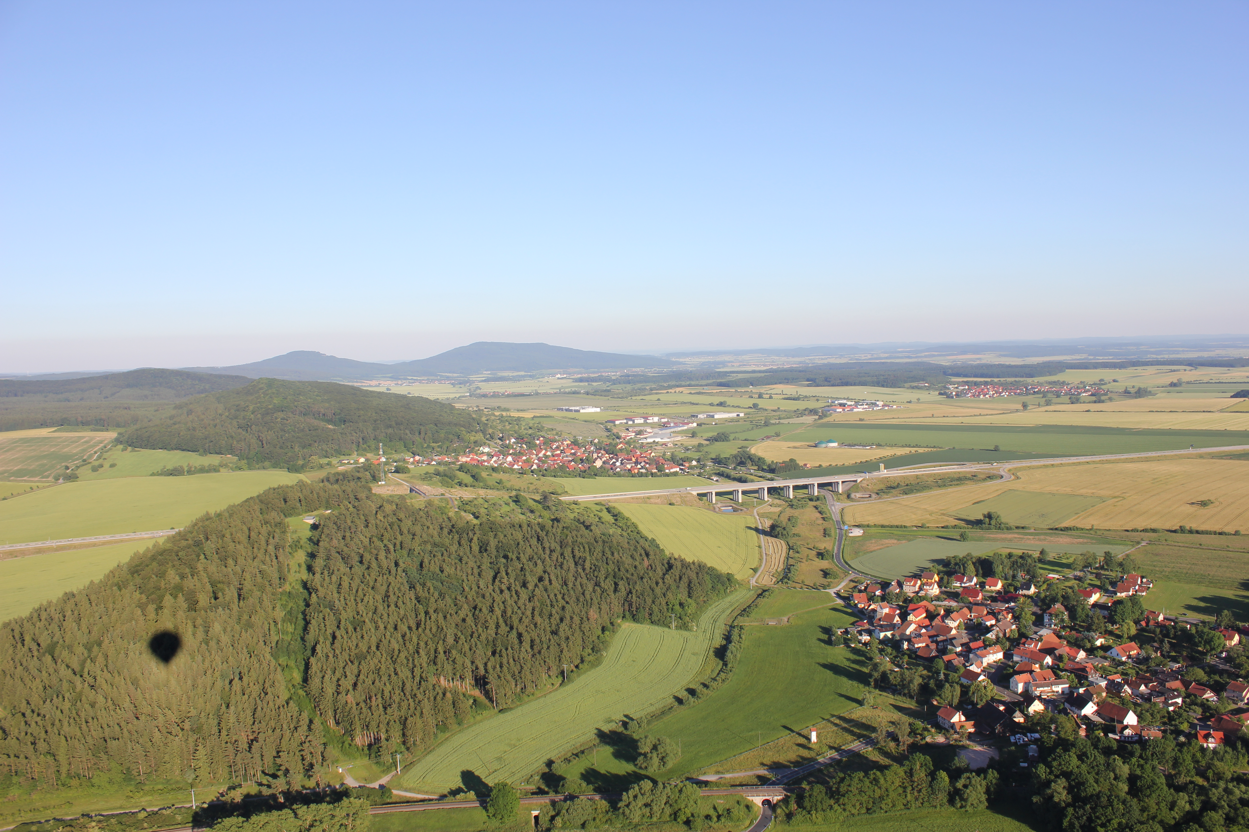 Aufgenommen von einem Heißluftballon. Im Hintergrund die A71, sowie die Grabfeld-Ortsteile Queienfeld (links) und Wolfmannshausen (rechts).